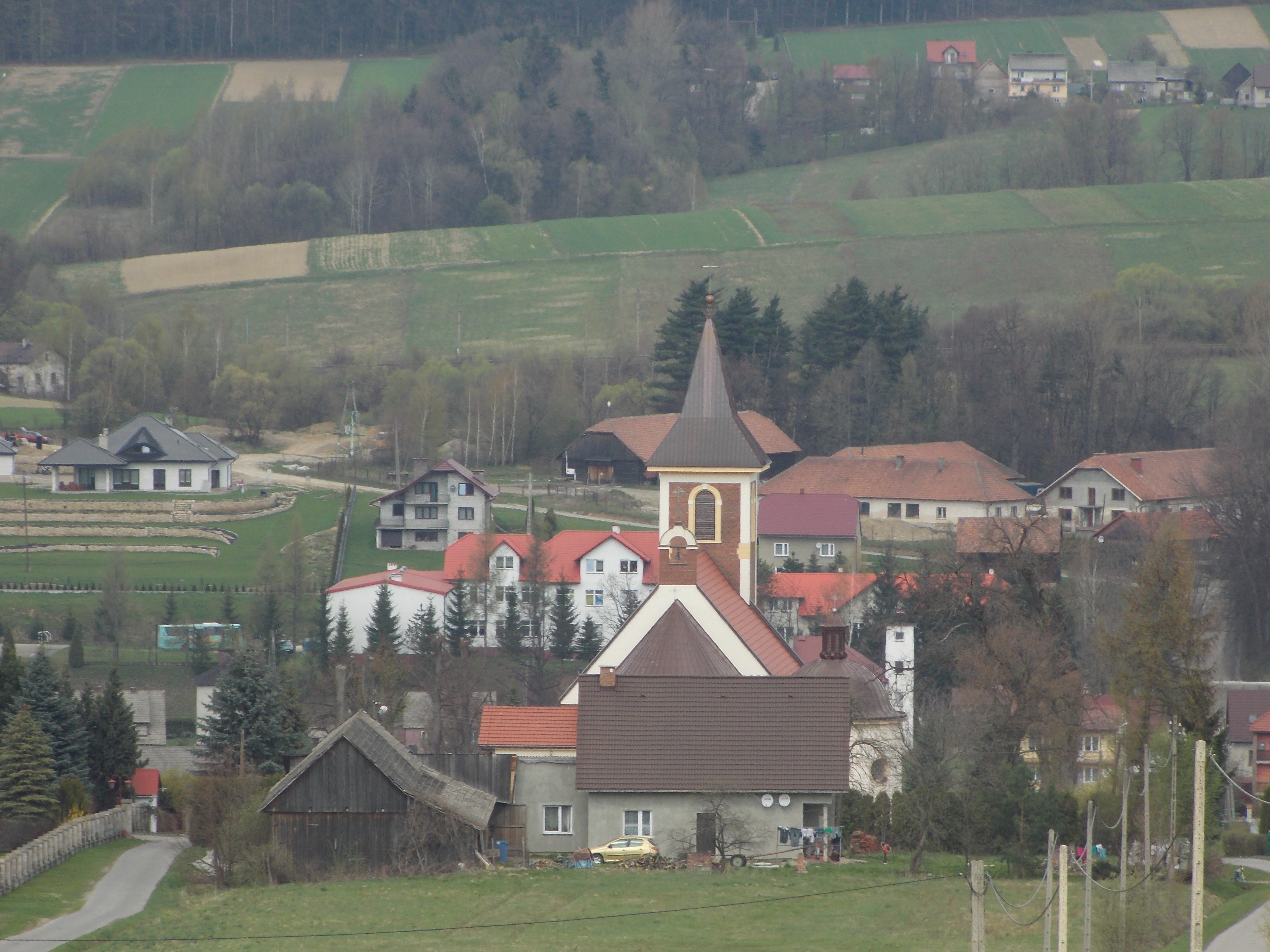 Закжув, Вадовицкий повят